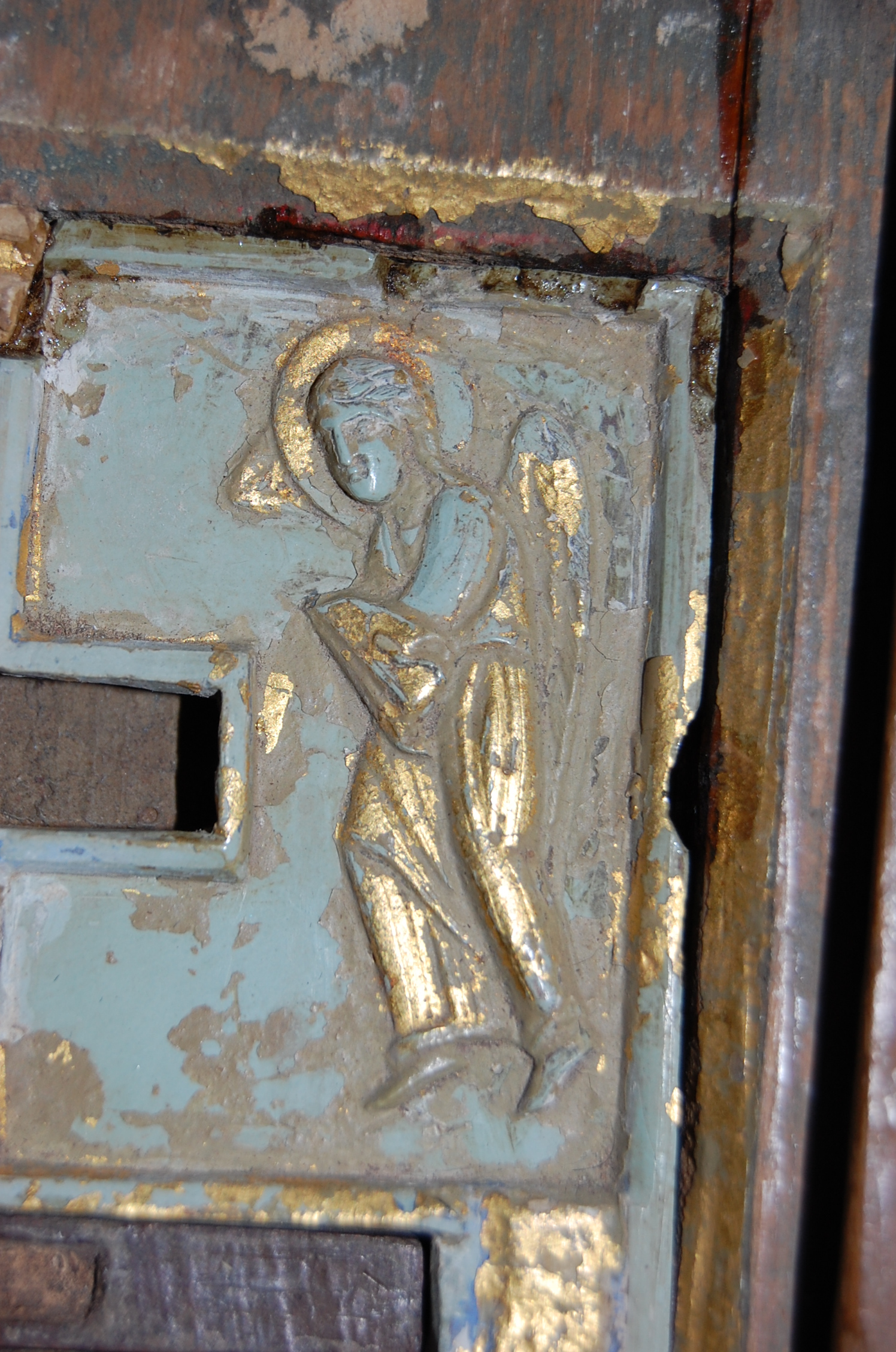 Angelo destro posto nella posizione riscontrata anche nel FIAT, Annunciazione del Santo Arcangengelo alla Vergine Maria, o in atto di adorazione alla Santa Croce di Cristo. Stauroteca in Lentini Chiesa Madre Santa Maria la Cava e Sant'Alfio. Steatite scolpita e dipinta in oro.